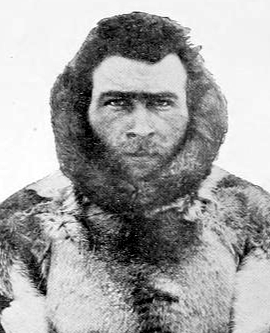 Lauge Koch (1892-1964) auf der 2. Thule-Expedition.